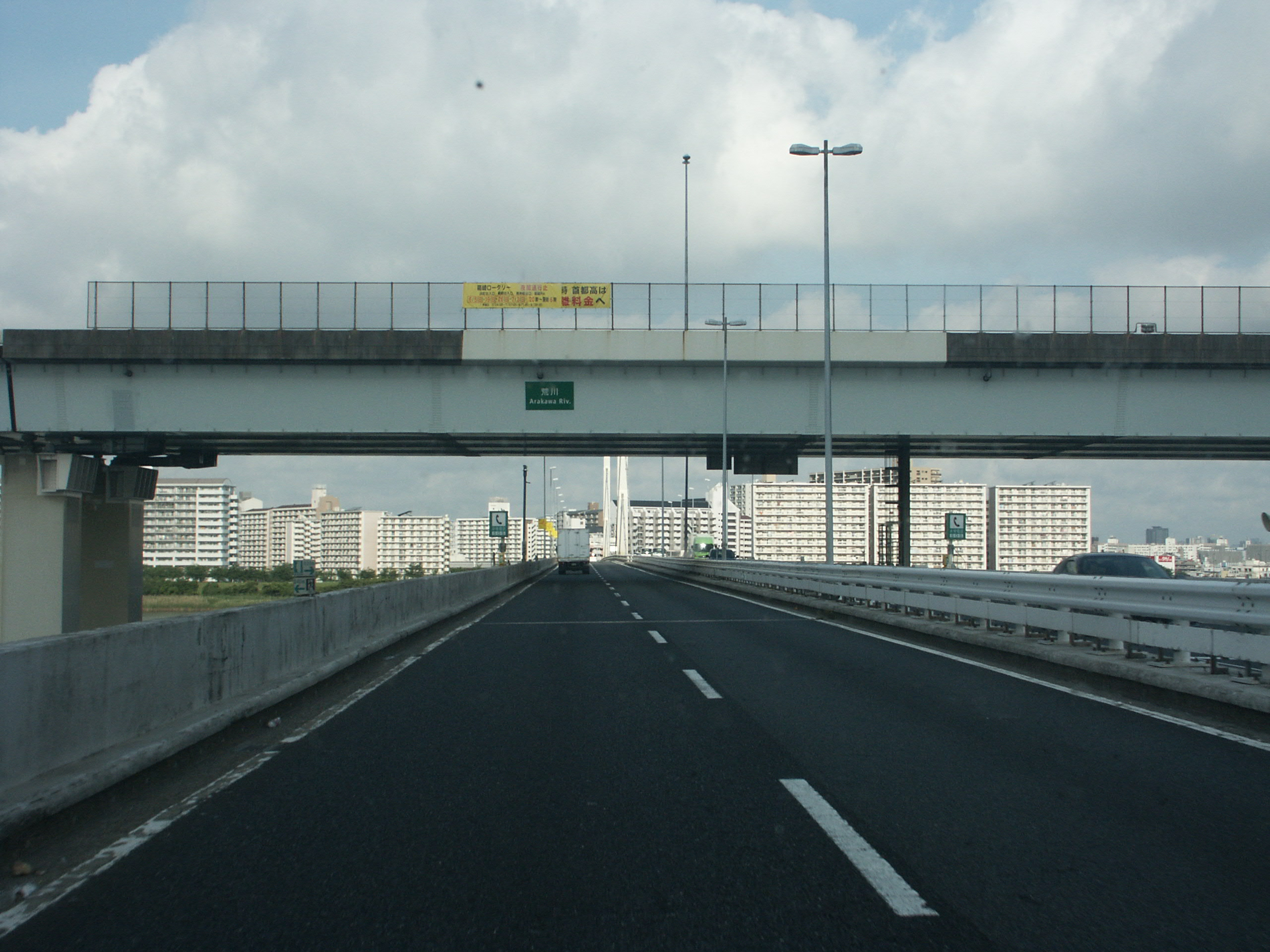 首都高速7号小松川線上り江戸川区西小松川付近